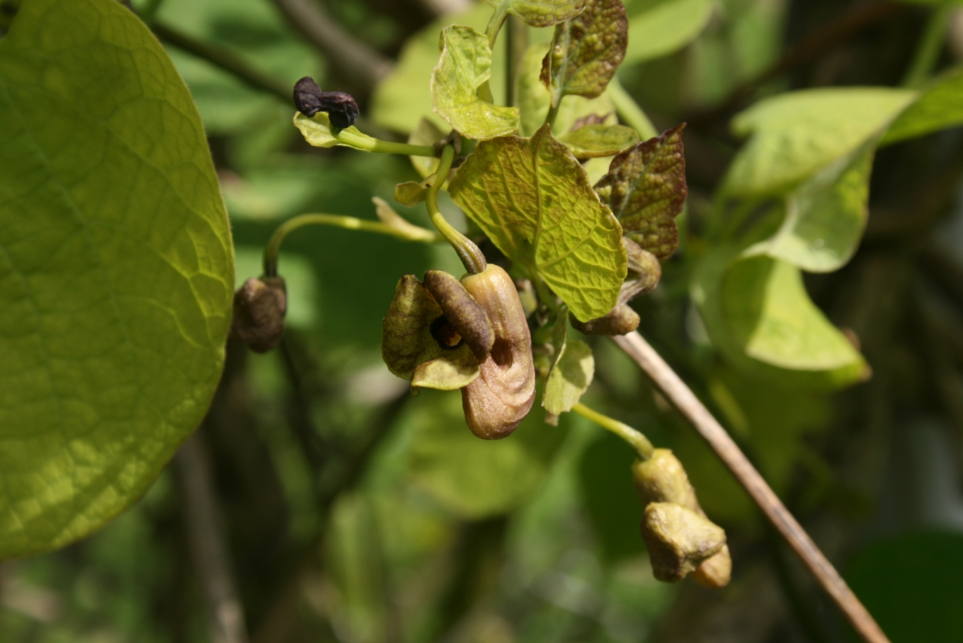 Tobakspibeplante (Aristolochia macrophylla): Blomst.